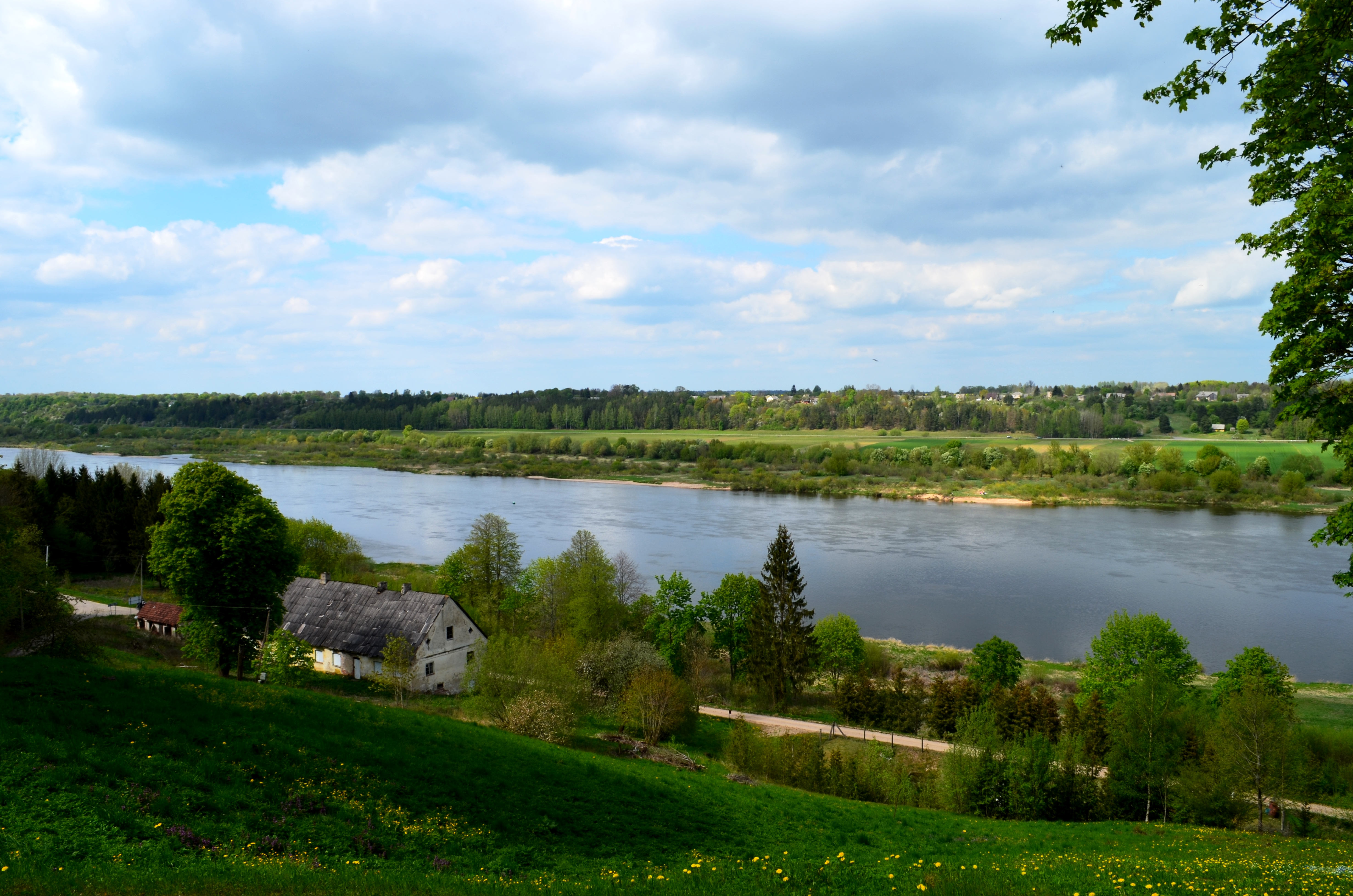 Nemunas ties Ilguva, Šakių raj.